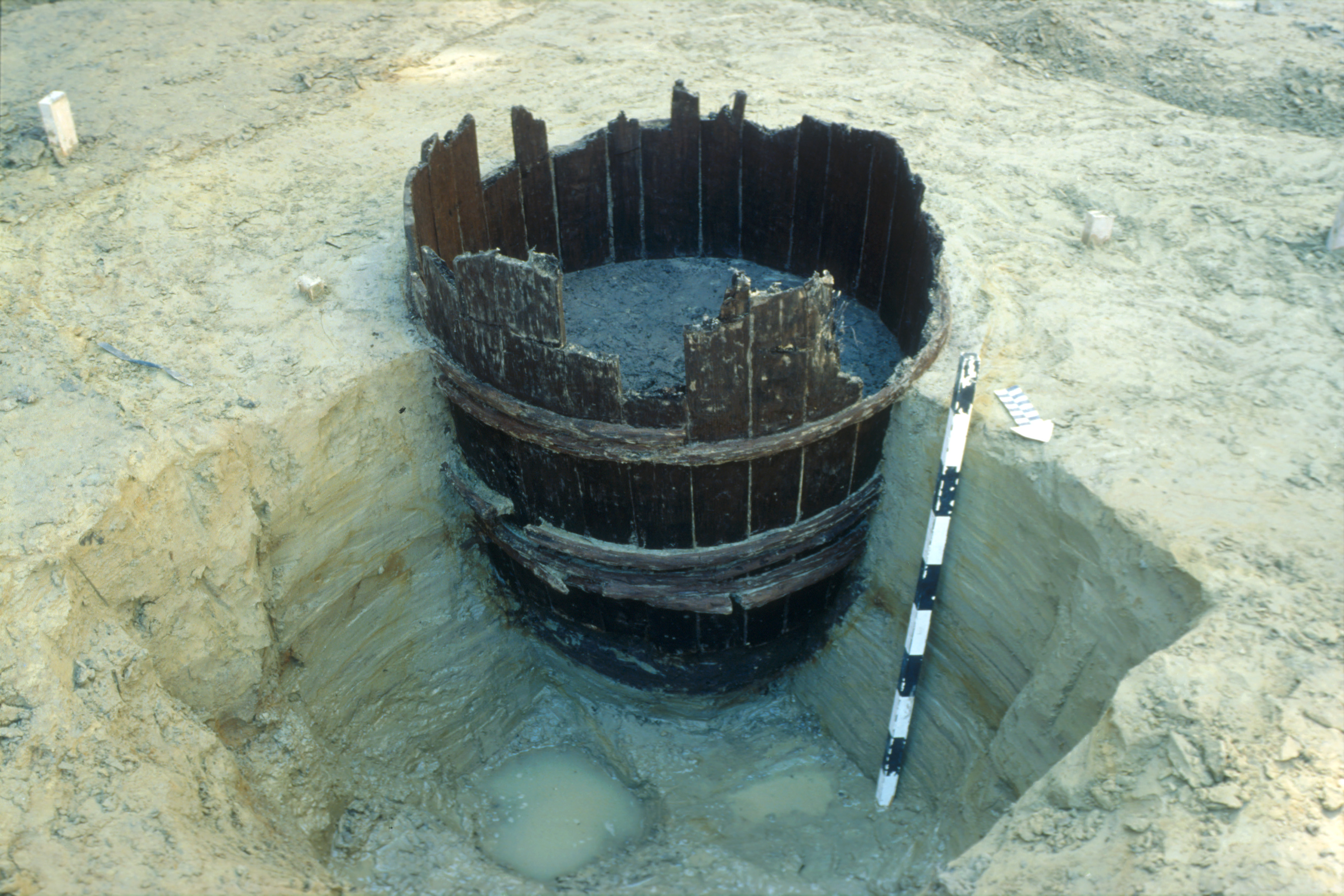 Arbon: Spätrömisches Eichenfass mit Rutenbindung aus dem westlichen Kastellgraben